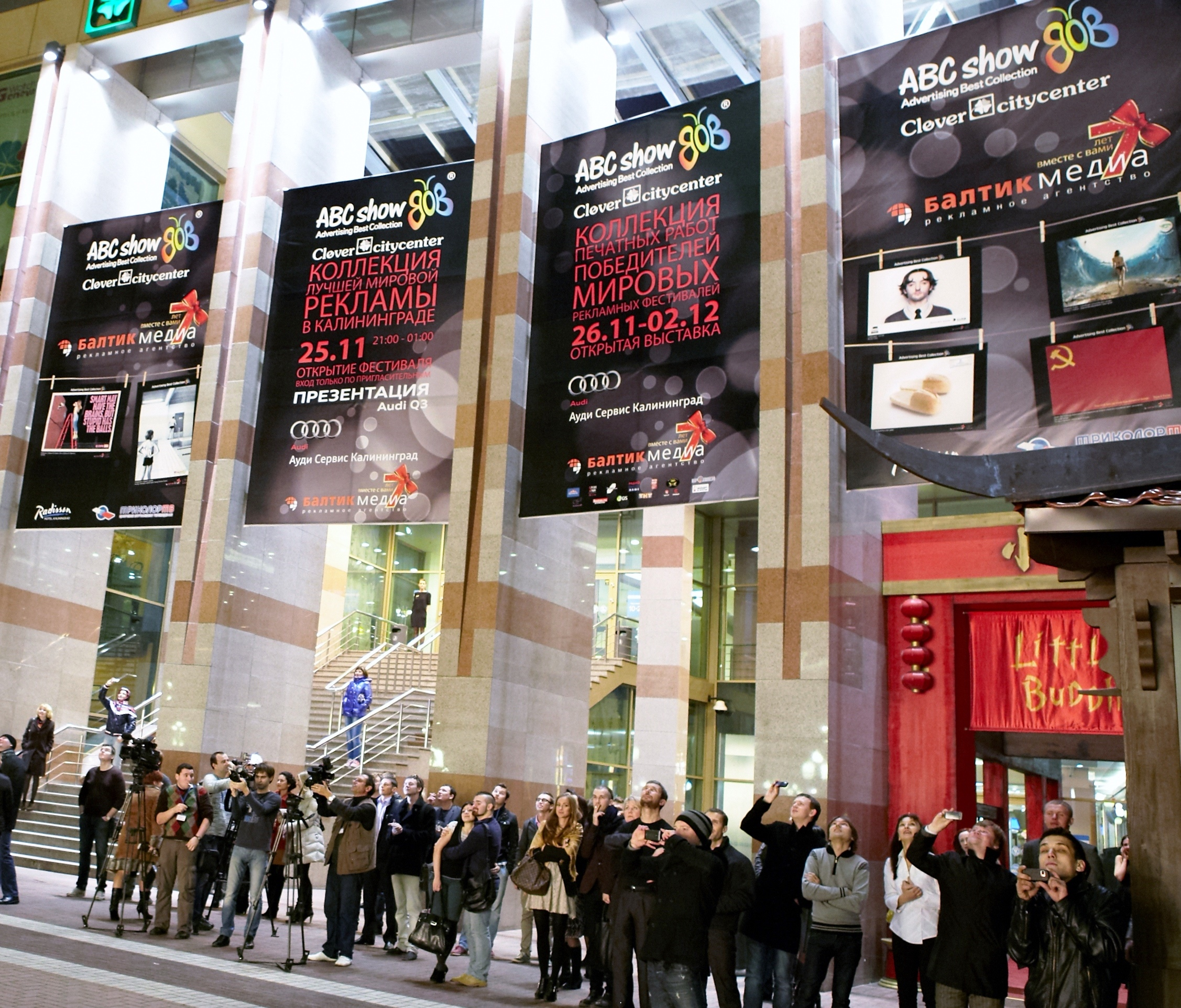 Фейерверк после показа ABC Show